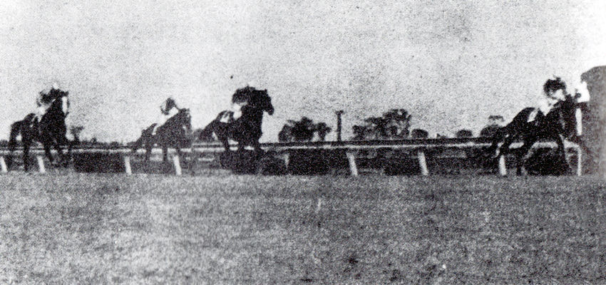 1944年6月18日、能力検定競走（日本ダービー）